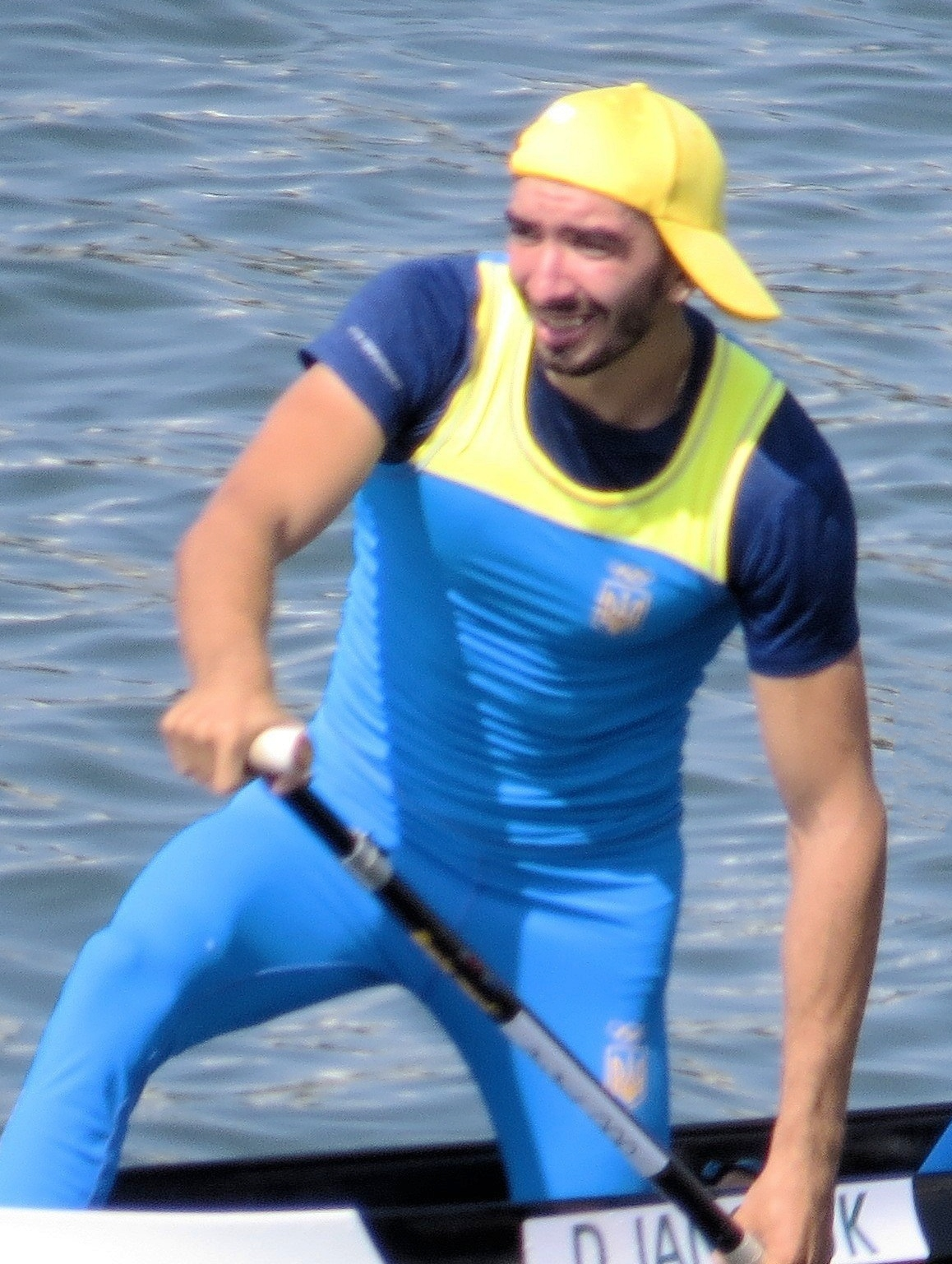 Sx50